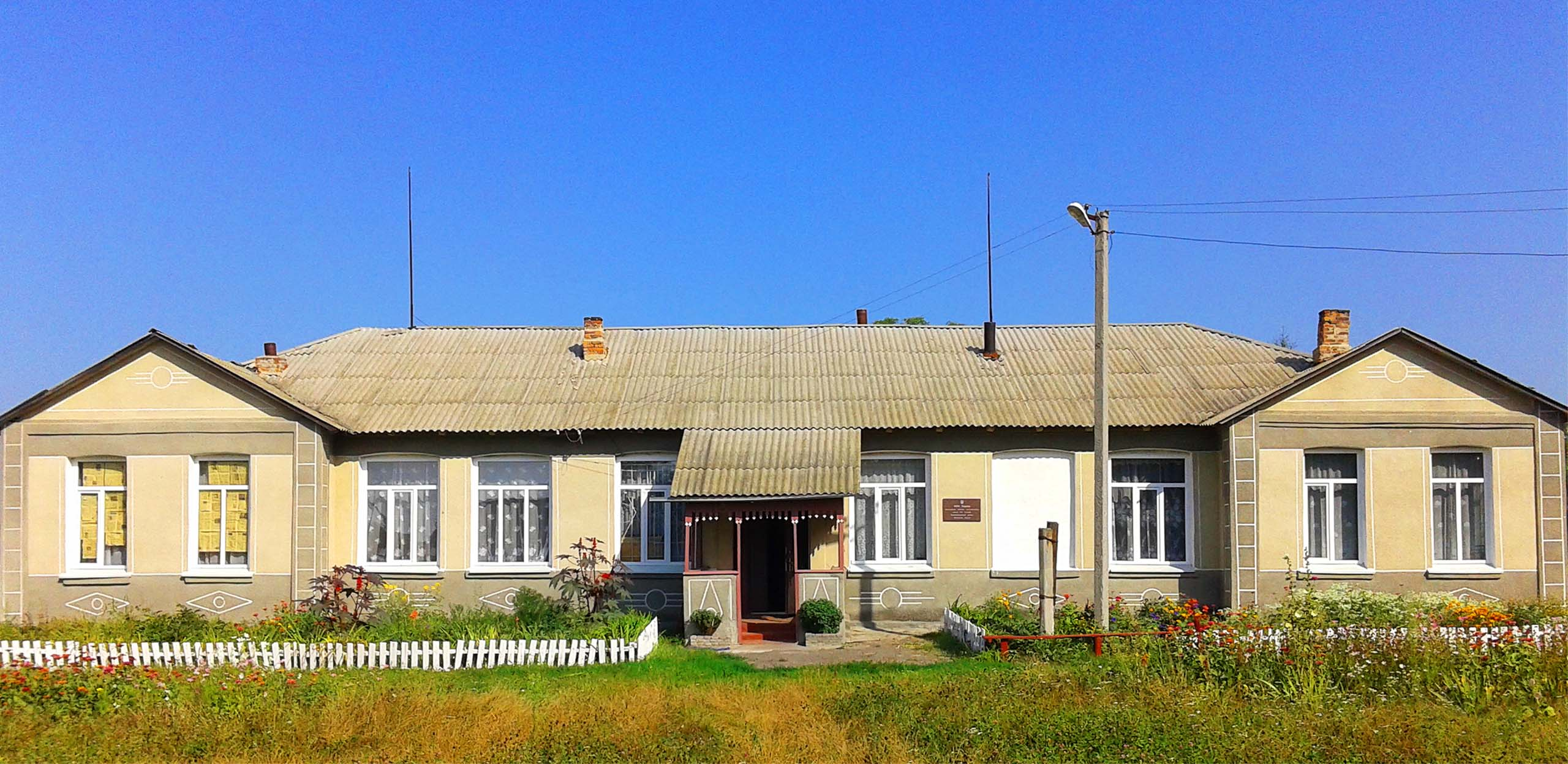 Довгалівська загальнооствітня школа І-ІІ ст. Погребищенського р-ну Вінницької обл.